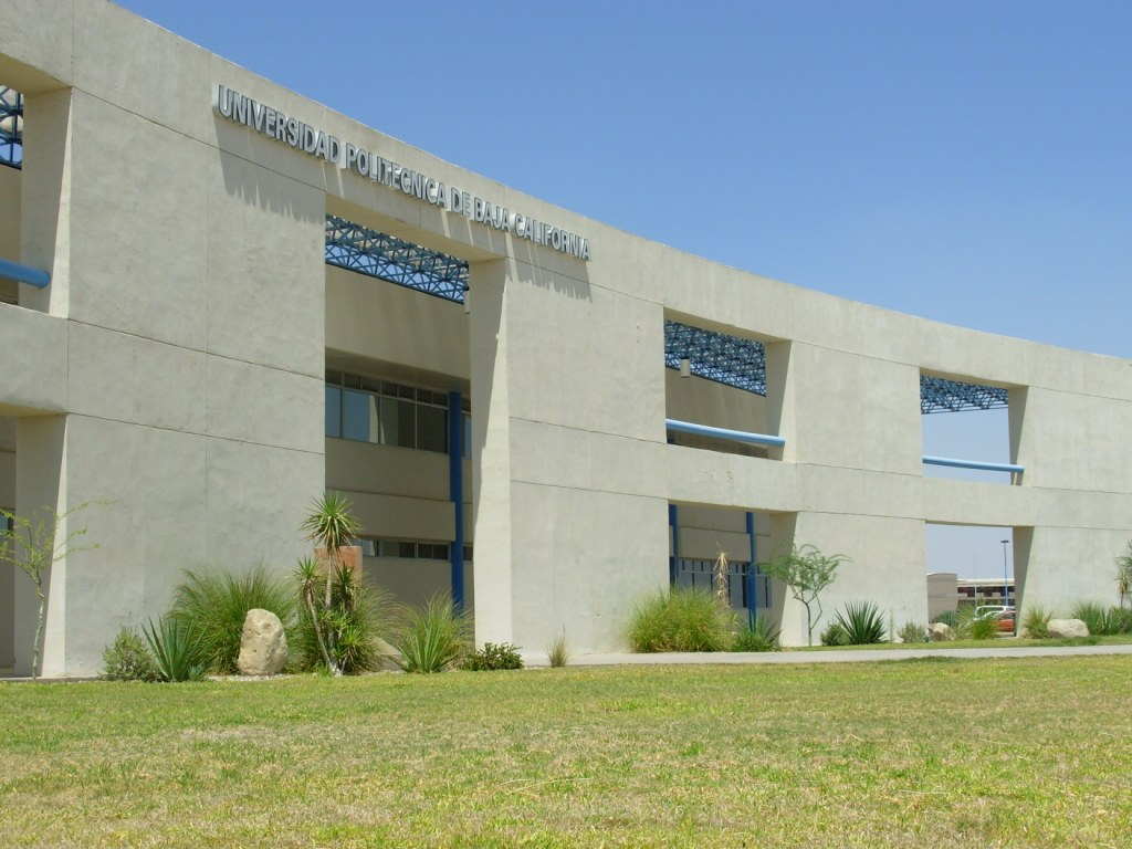 Fachada principal del primer edificio académico en la Universidad Politécnica de Baja California